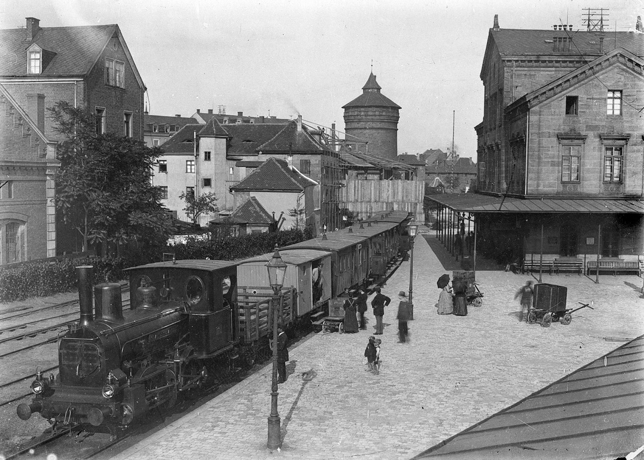 Photo - Nürnberg - Ludwigsbahnhof